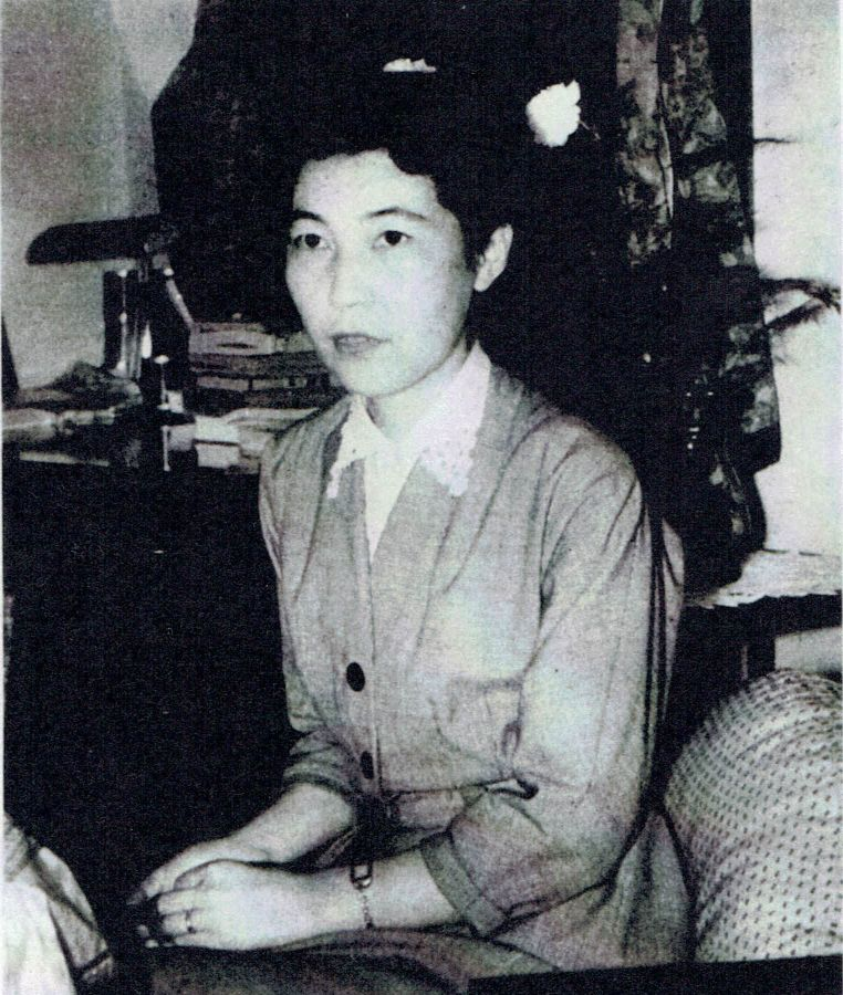 六興出版社『小説公園』第7巻第8号（1956）より芝木好子